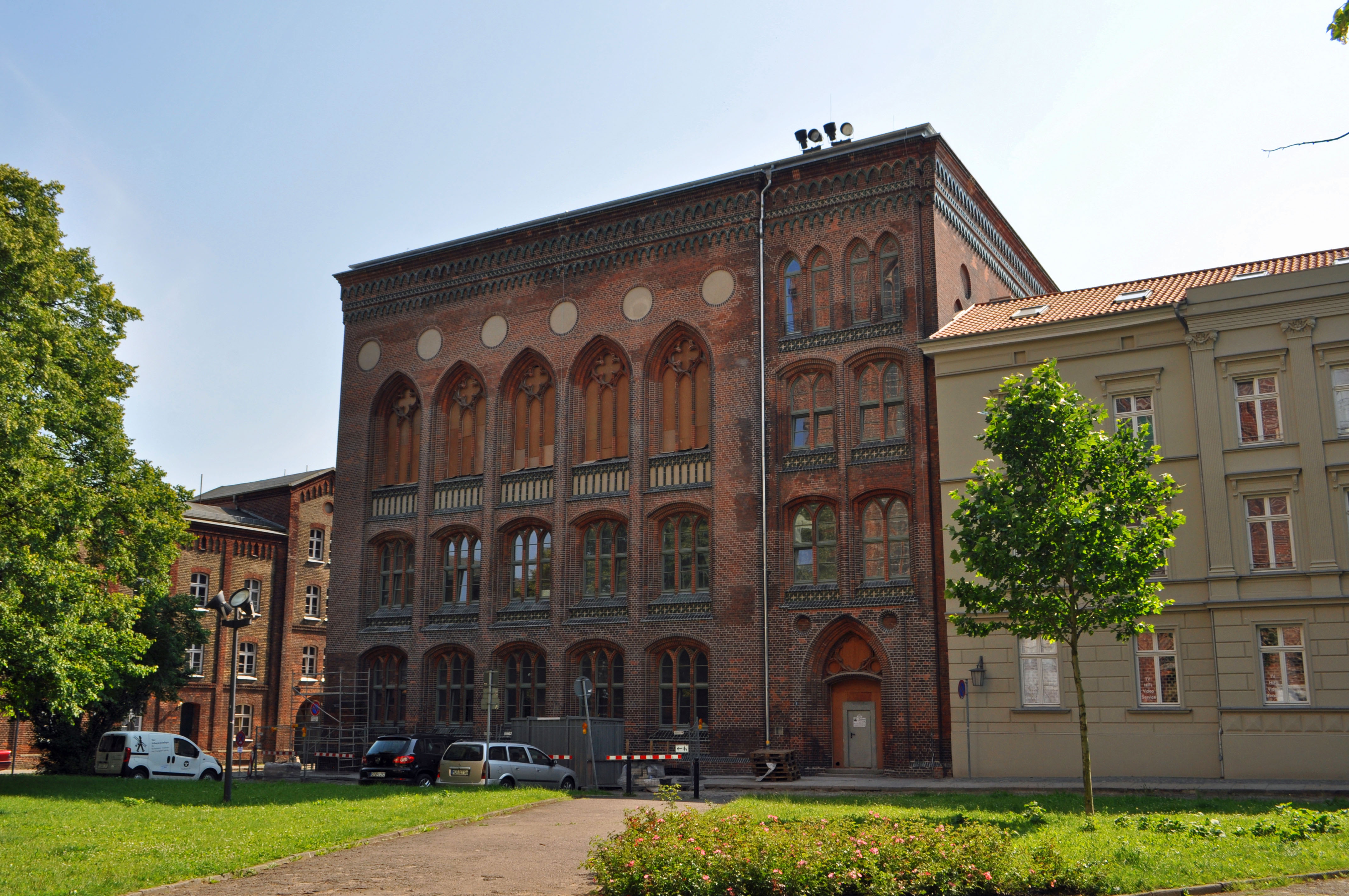 Foto aufgenommen in der Marienkirche in Stralsund am 7.7.2013. Stralsund, Bleistraße 4 This is a photograph of an architectural monument.